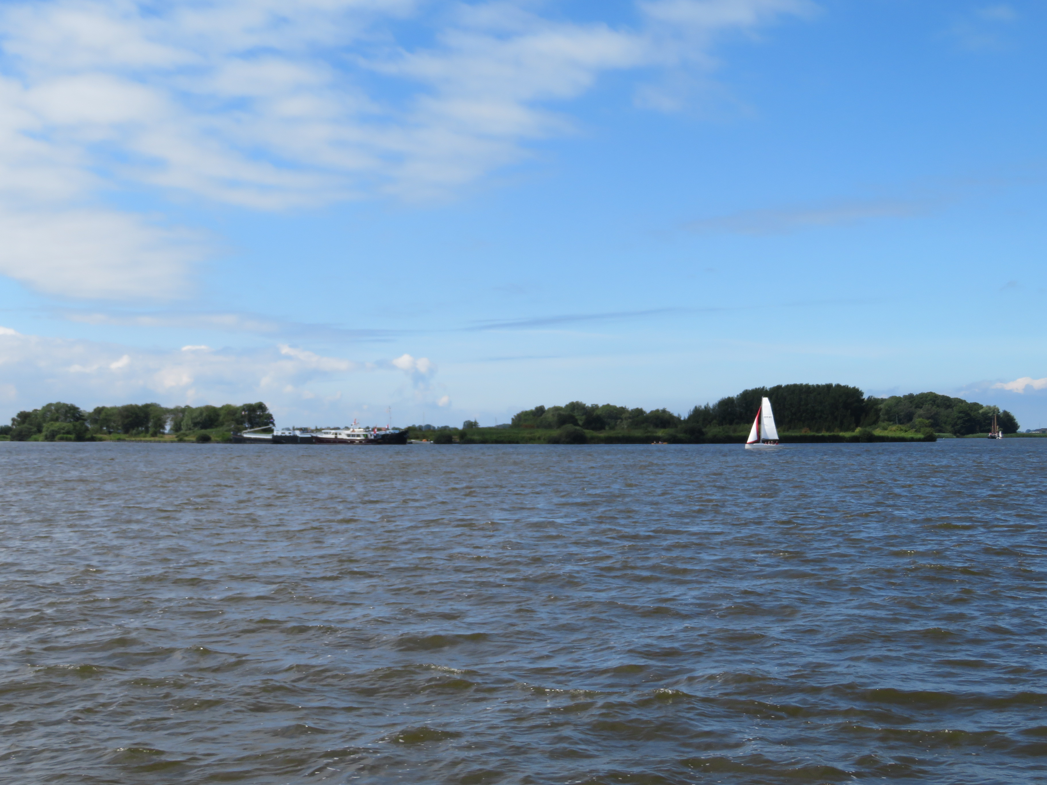 Langehoekspolle is een kunstmatig eiland in de Fluessen, Friesland